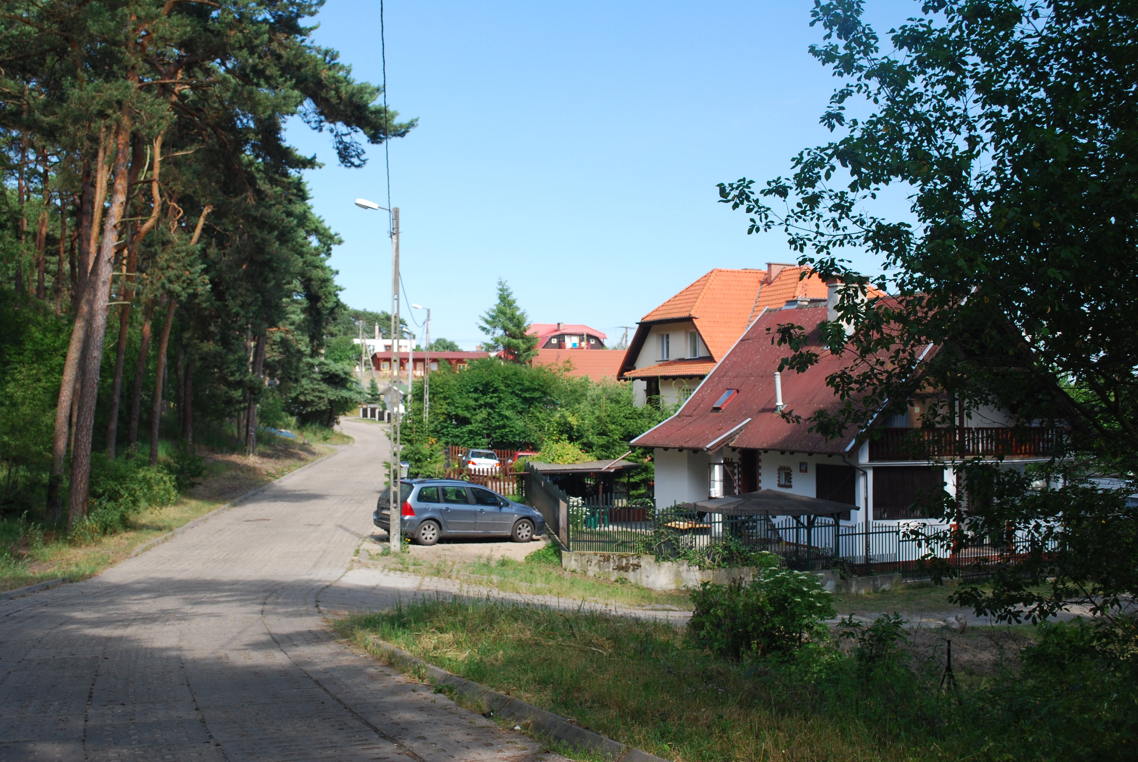 Ulica w Piaskach.